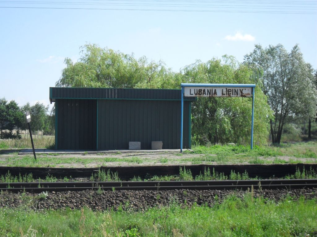 Stacja kolejowa w Lubania Lipiny.